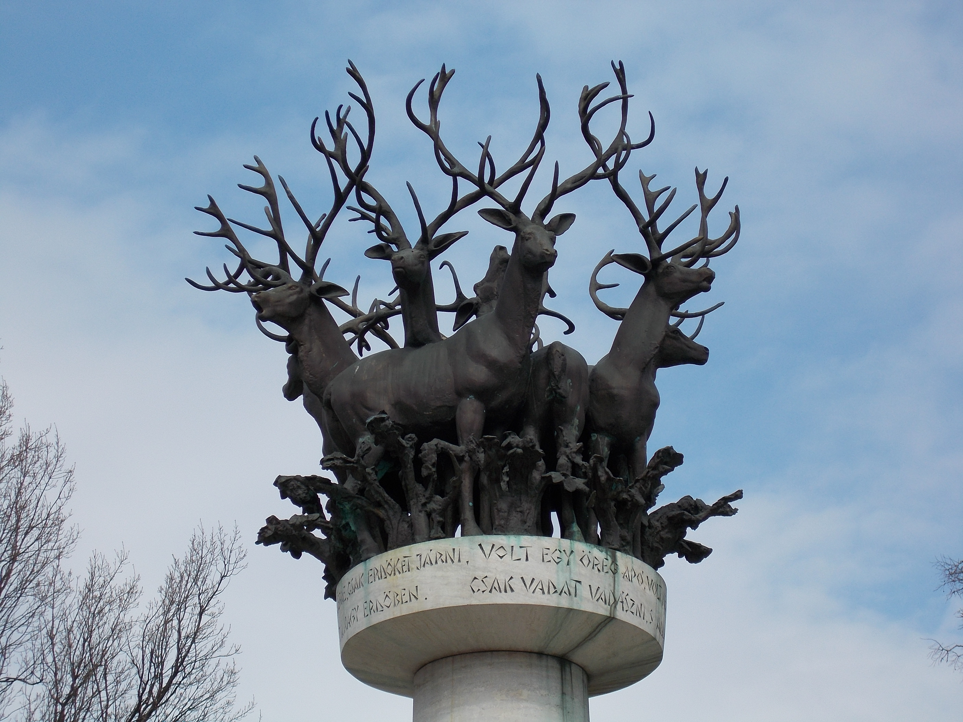 Marton László : Milleneum emlékmű. Cantata Profana kút avagy a Kilenc csodaszarvas kút. Királyhágó tér. Budapest 12